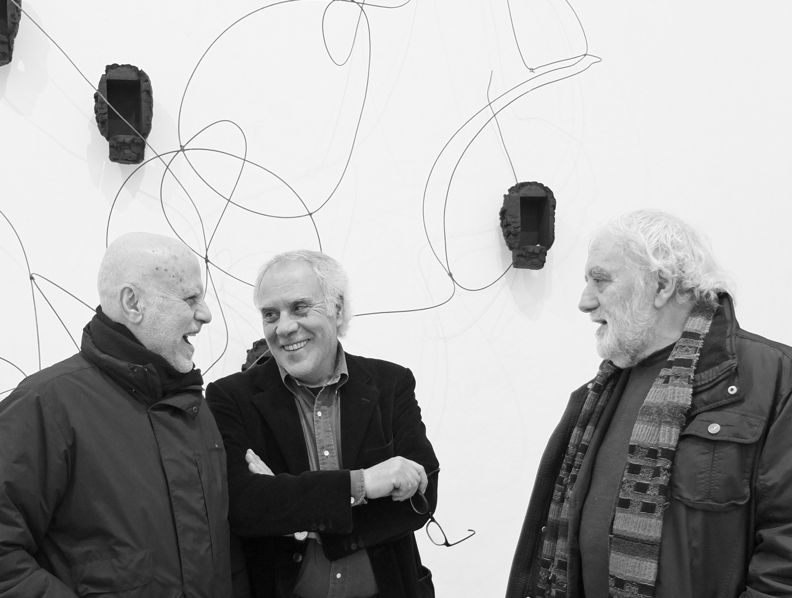 Il critico d'arte con il celebre fotografo e l'artista campano a Milano